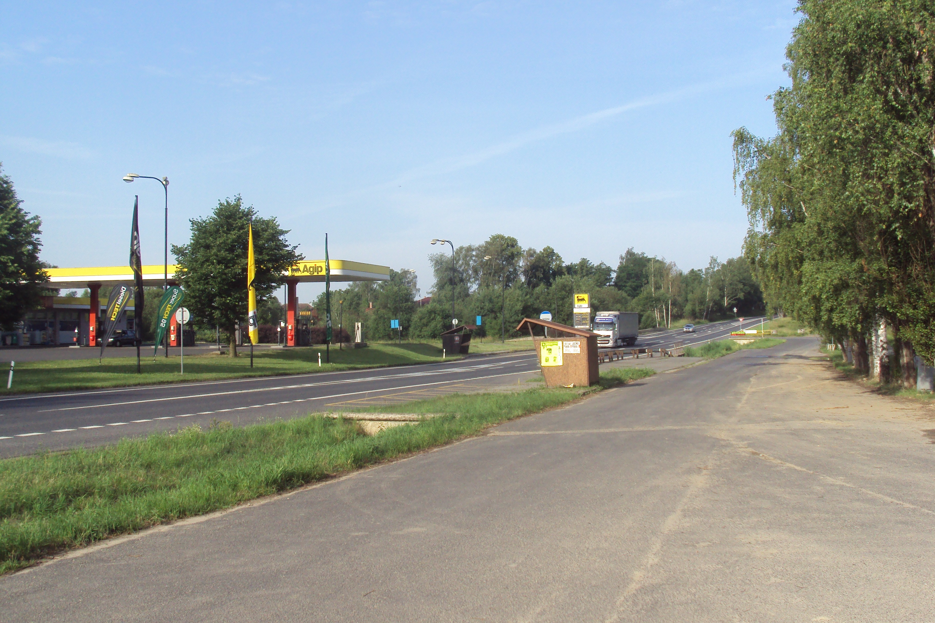 Benzinka Agip na E442 v Jablonném